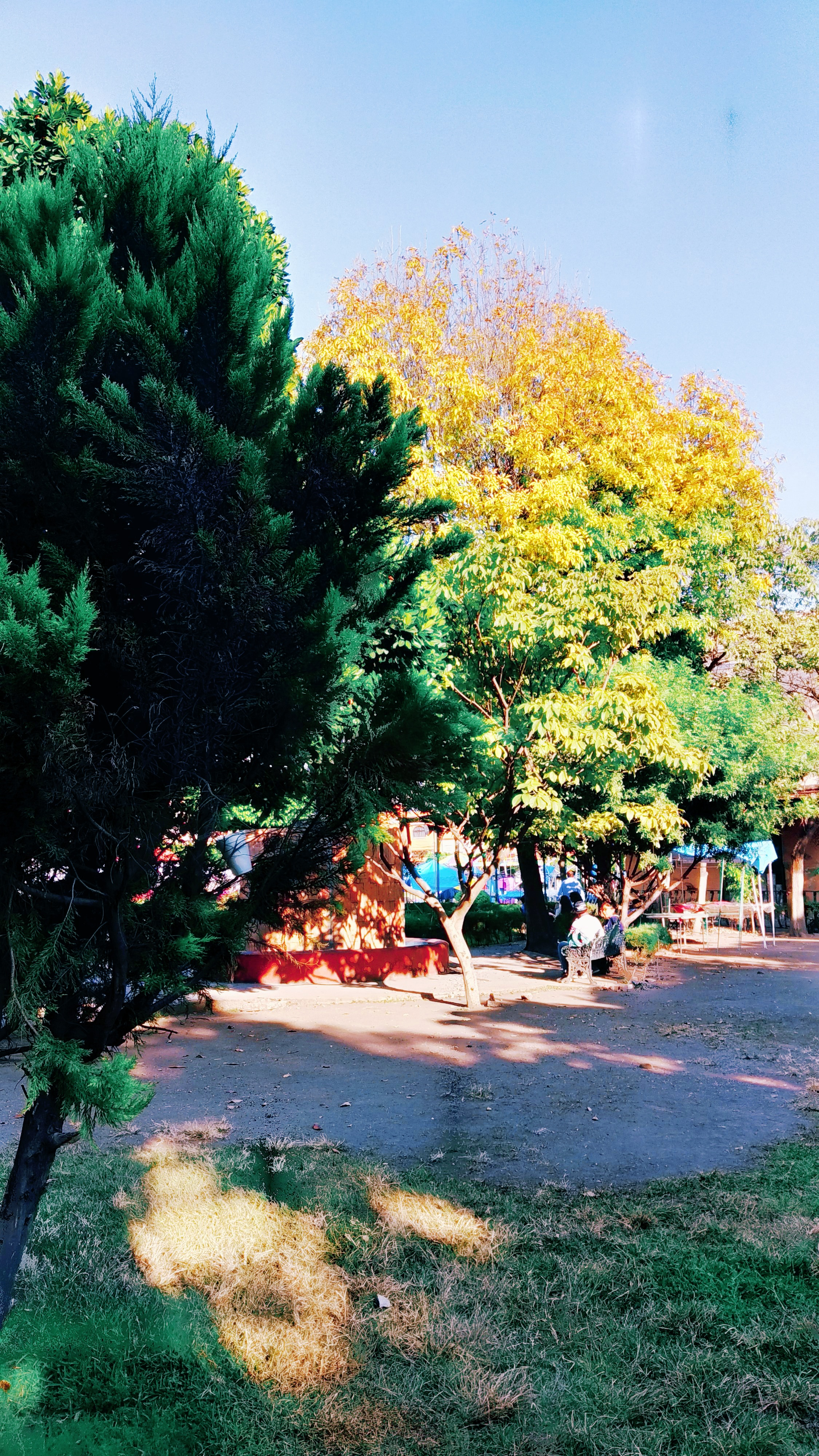 Otoño Cuautla, Morelos, Mexico.